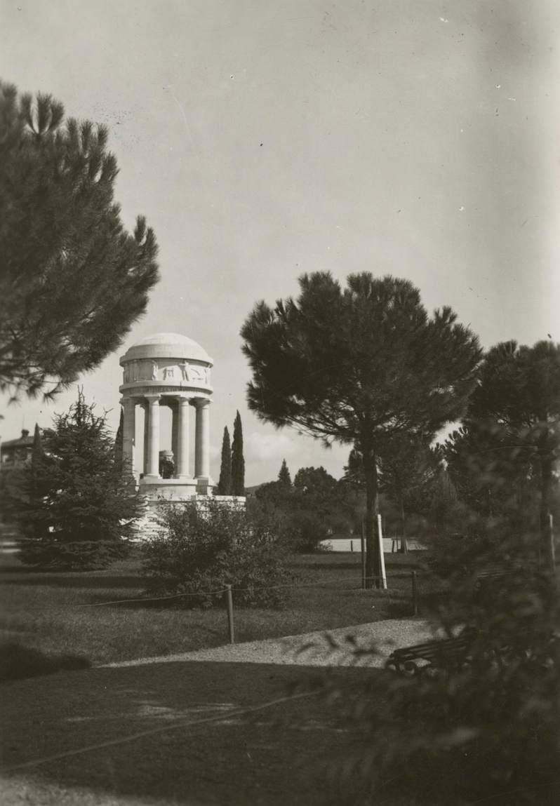 Gorizia - Parco delle Rimembranze Monumento ai caduti